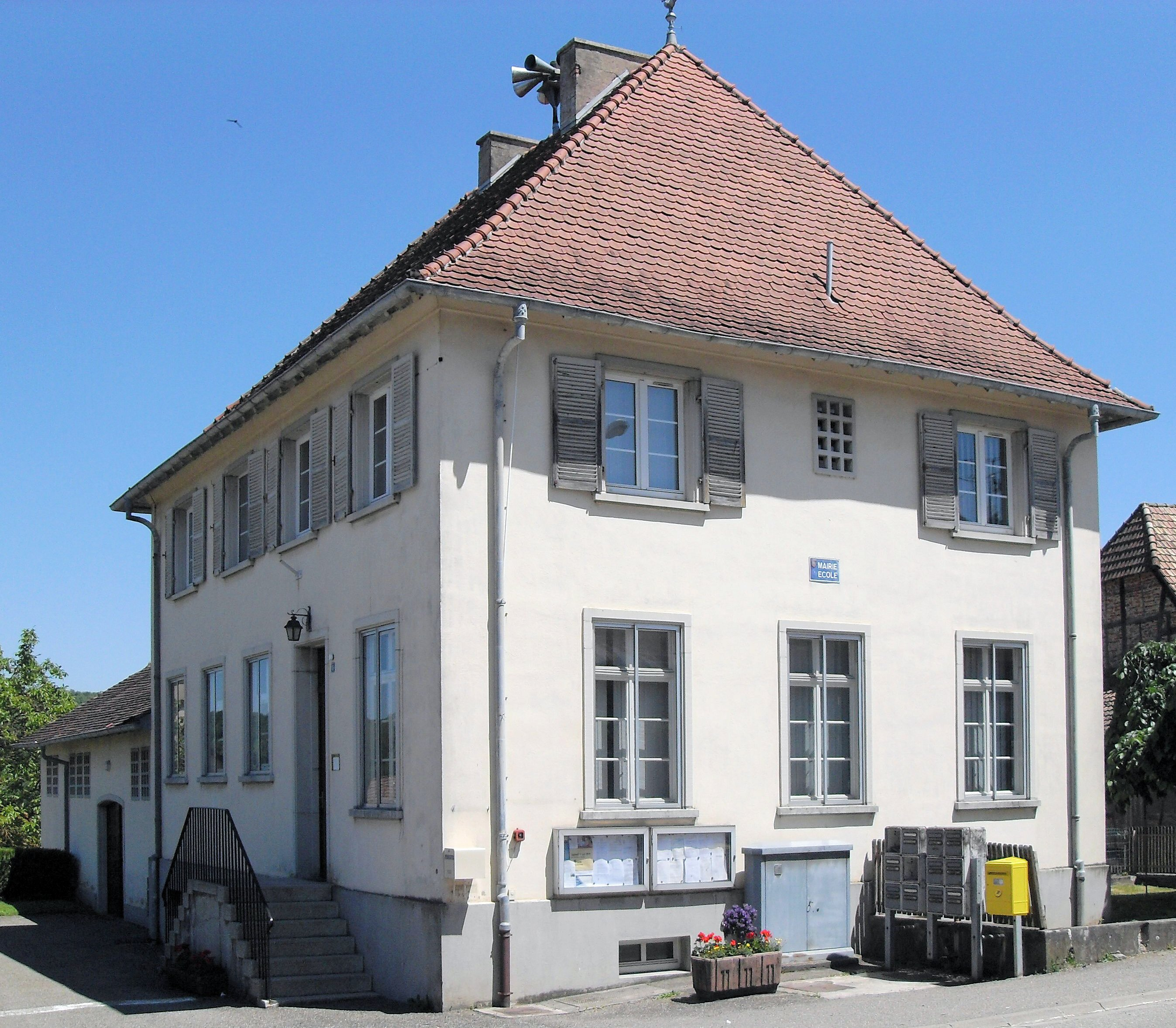 La mairie-école de Saint-Ulrich